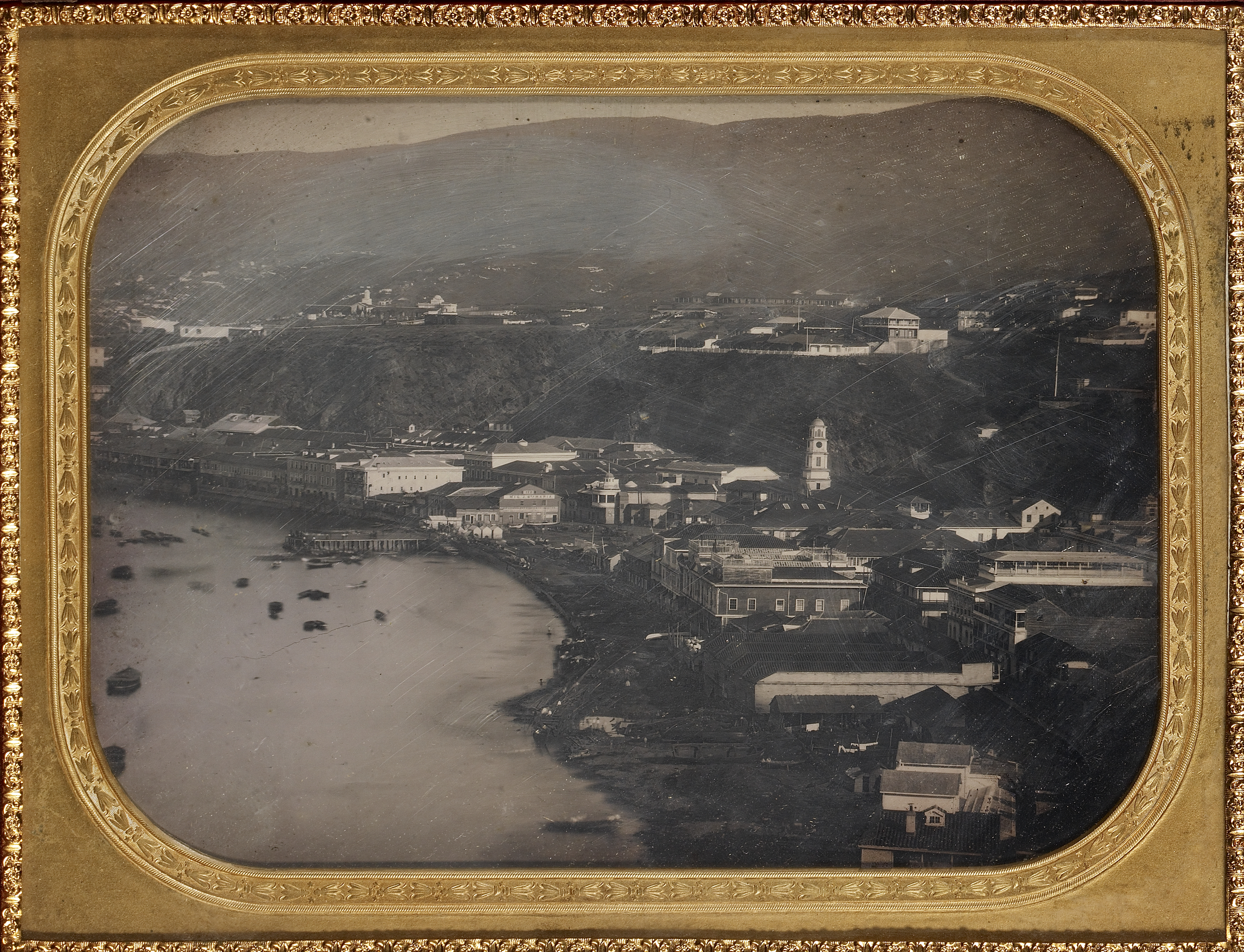 Corte de Daguerrotipo que muestra una vista de la zona puerto de Valparaíso, específicamente lo que actualmente es la Plaza Sotomayor, en el mar que se ve, actualmente se encuentran las calles Errazuriz, Brasil y las instalaciones portuarias. Aún no se construía la Bolsa de Comercio de Valparaíso, que se ubicará a la entrada del muelle. Esta primera bolsa de comercio sería mas tarde demolida para construir en su lugar el "Monumento a la Marina", actualmente conocido como Monumento a Los Héroes de Iquique, que sería inaugurado en 1886.